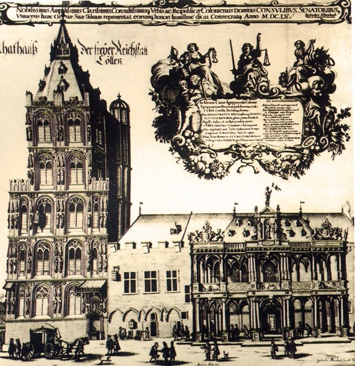 Historische Darstellung, Köln, Rathaus, Kupferstich um 1655